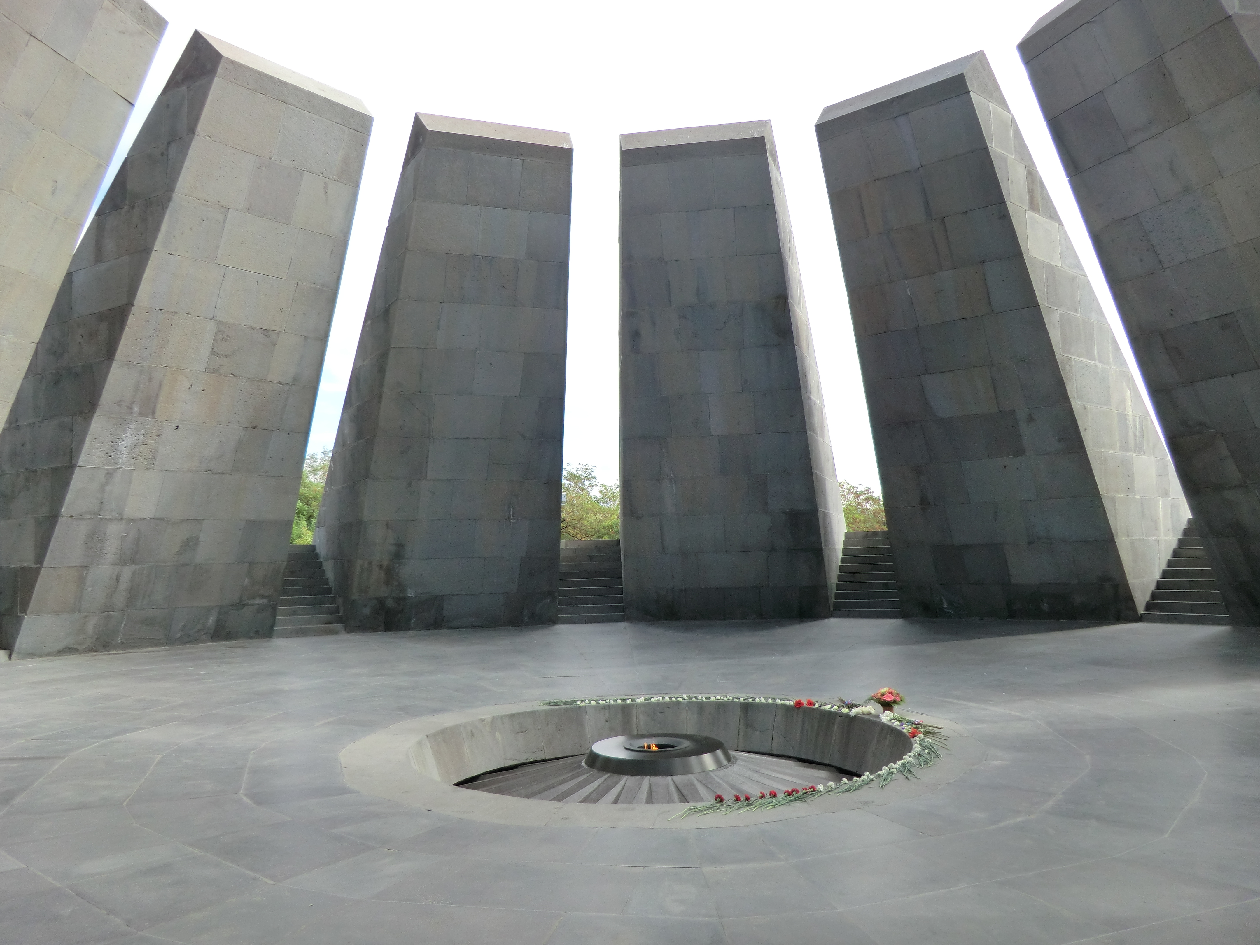 Tsitsernakaberd.